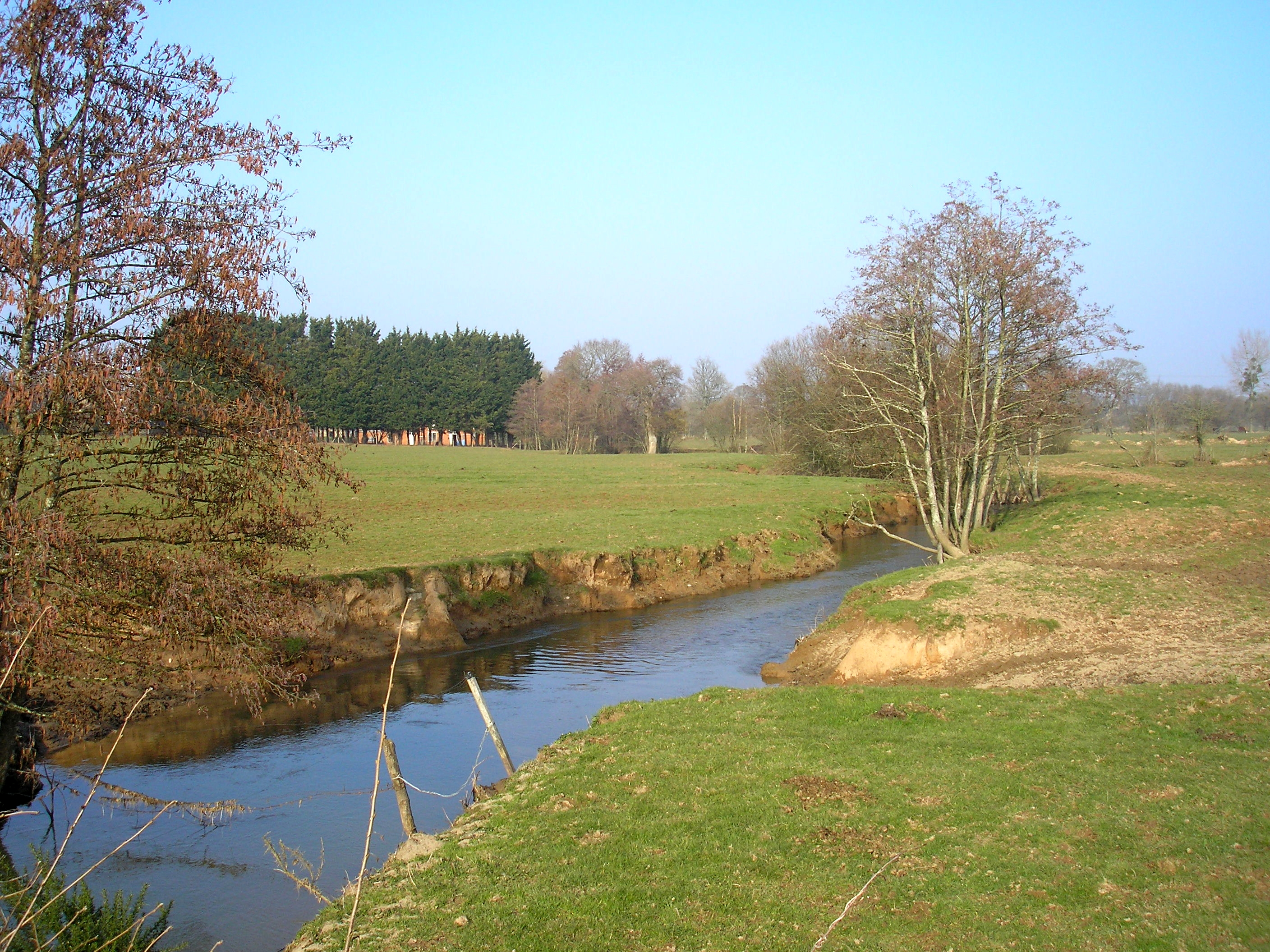 Le Lozon entre Remilly-sur-Lozon, à gauche, et Le Mesnil-Eury, à droite (Normandie, France).